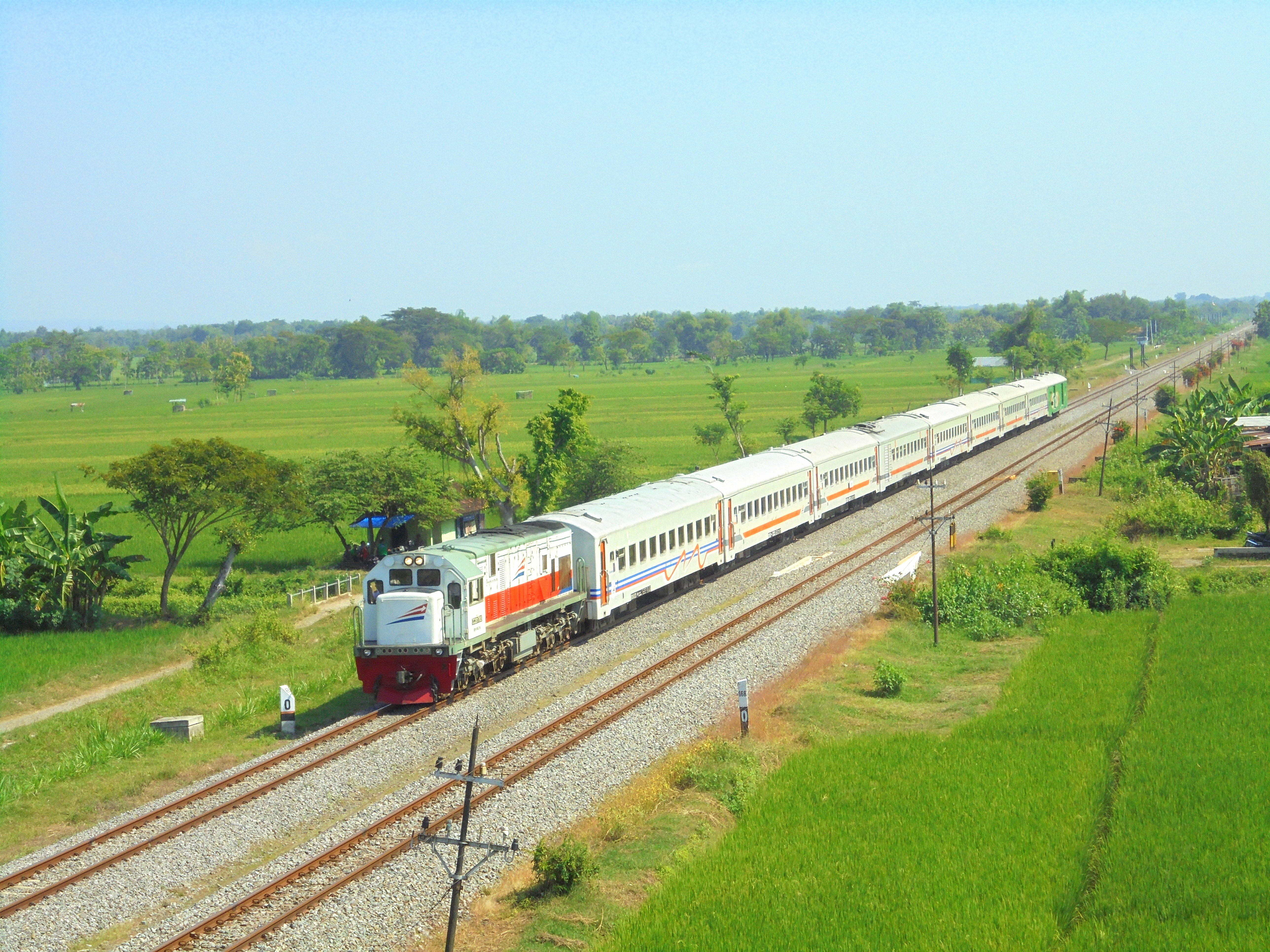 Kereta api Sri Tanjung saat melintas di persawahan Ngegong, Manguharjo, Madiun